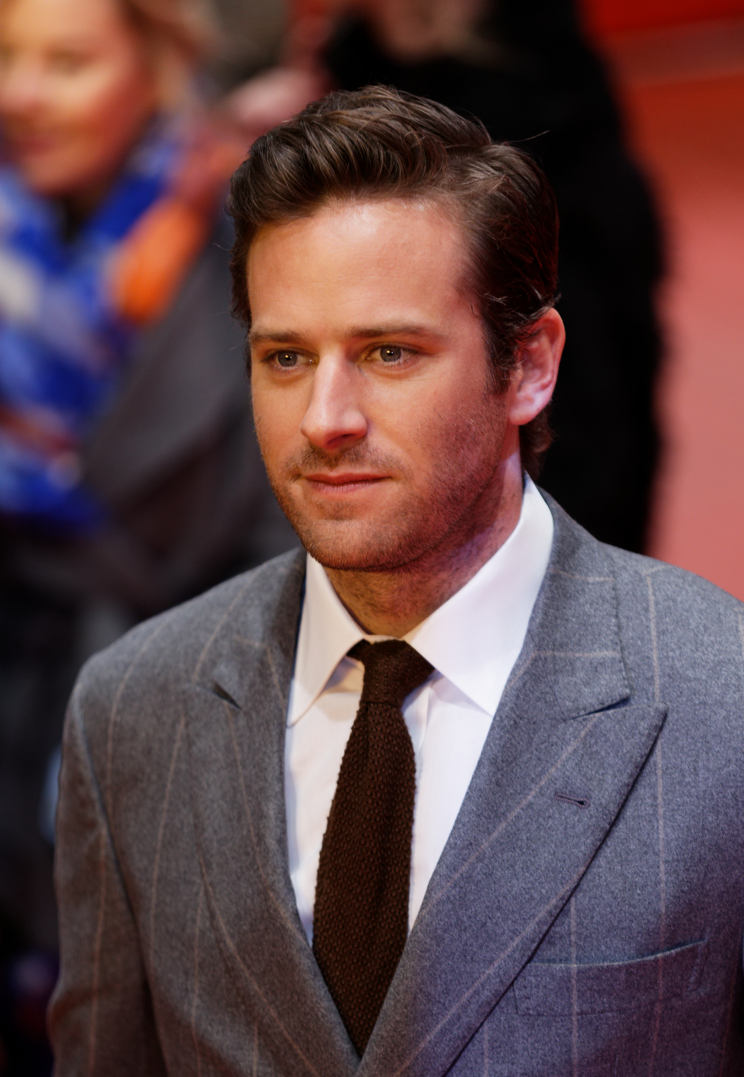 Charlie Hunnam bei der Premiere von Final Portrait bei der Berlinale 2017